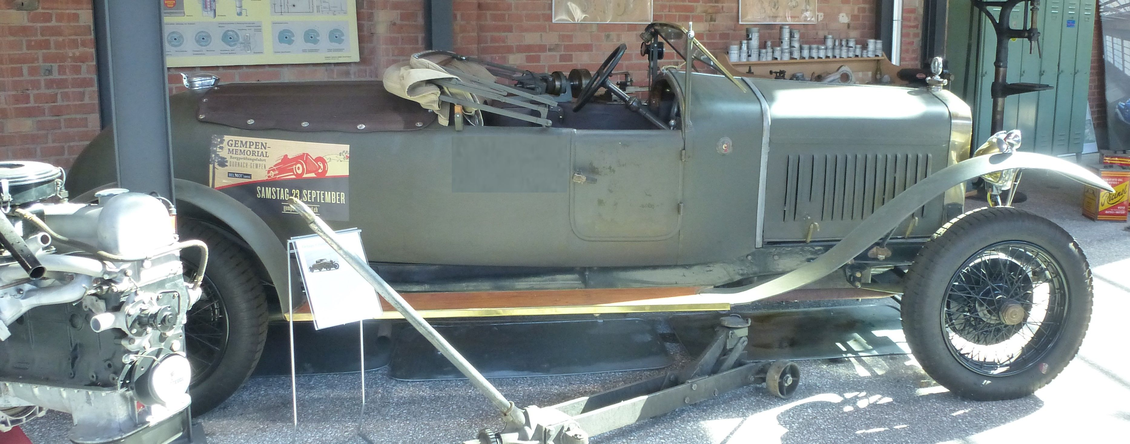 Delage Type DE 1922